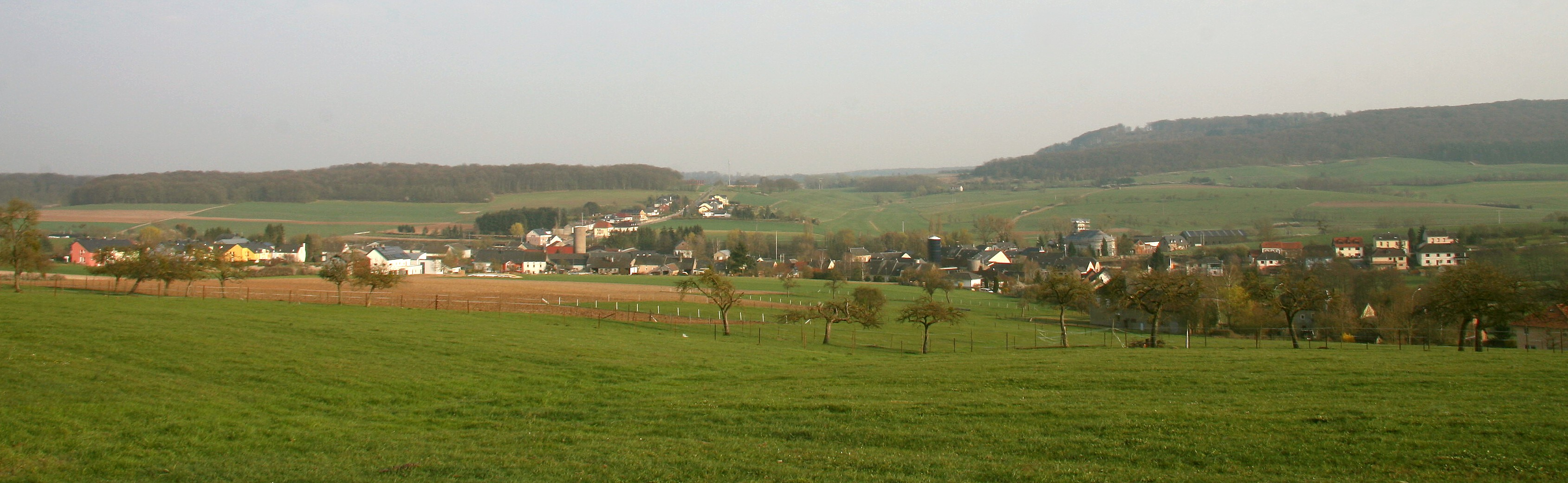 Panorama vun Ouljen.